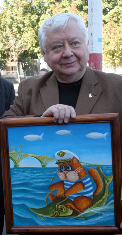 Российский актёр Олег Табаков с картиной